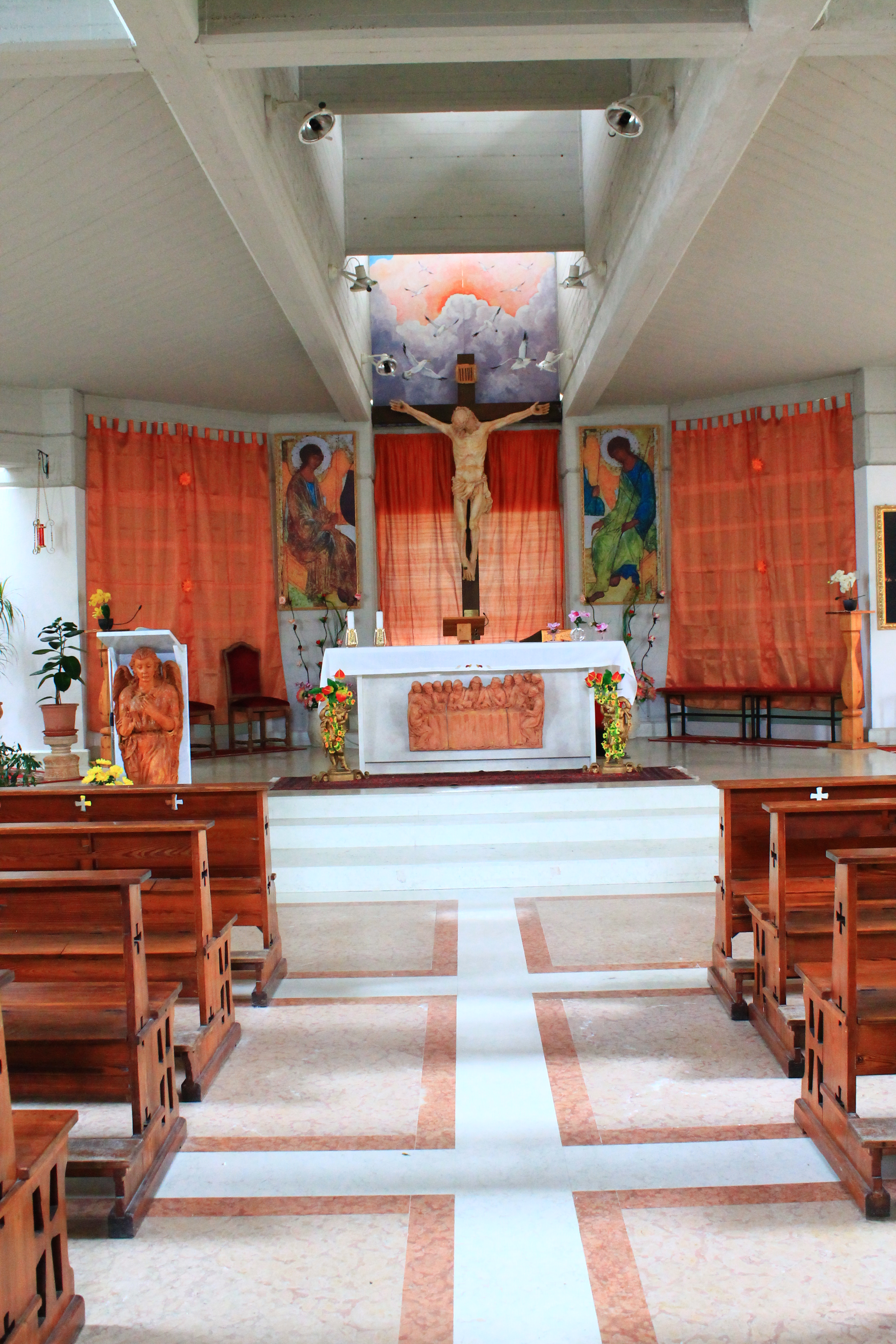 Chiesa di San Matteo Apostolo This is a photo of a monument which is part of cultural heritage of Italy.